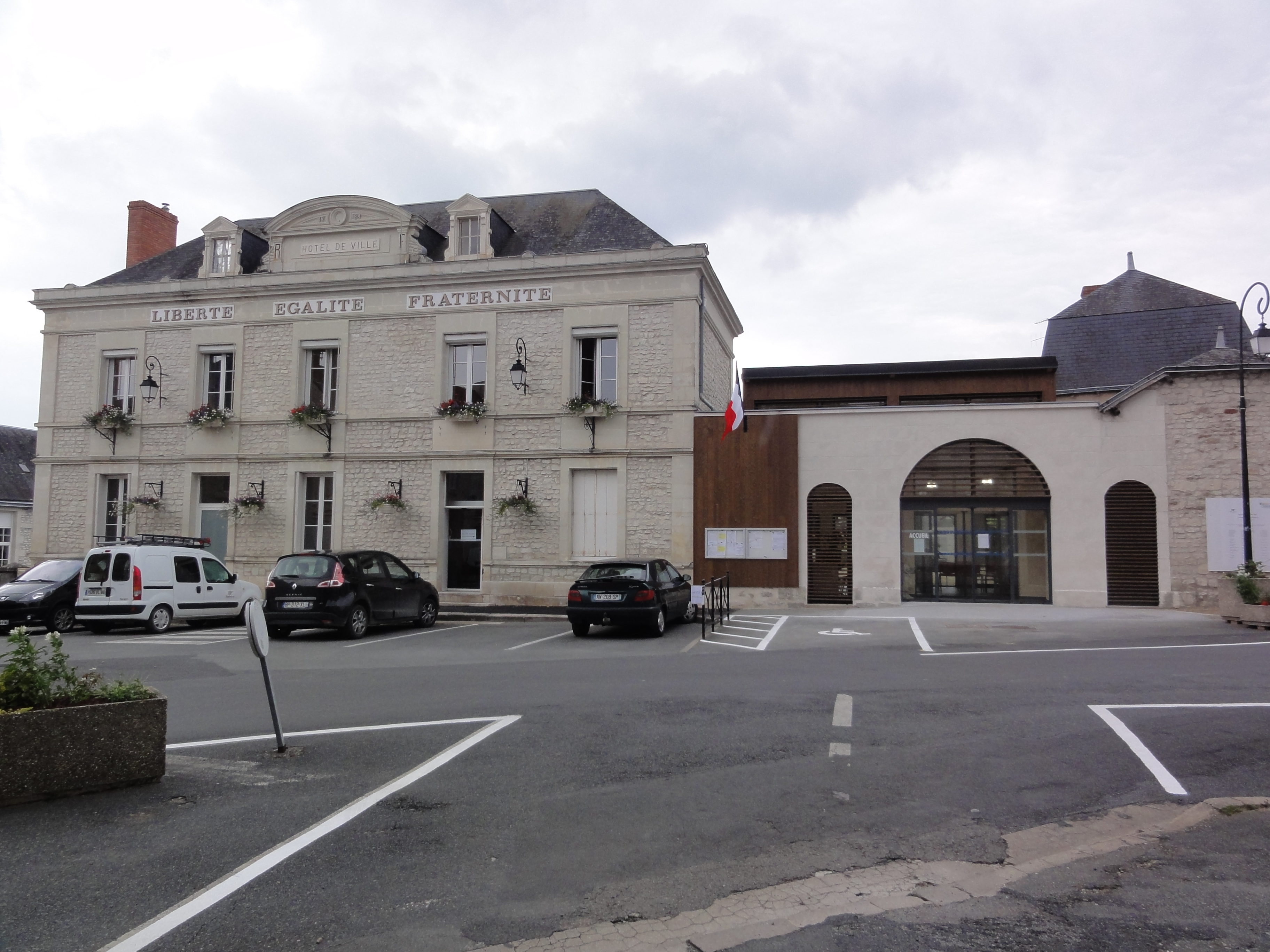 Naintré (Vienne, France) - la mairie.